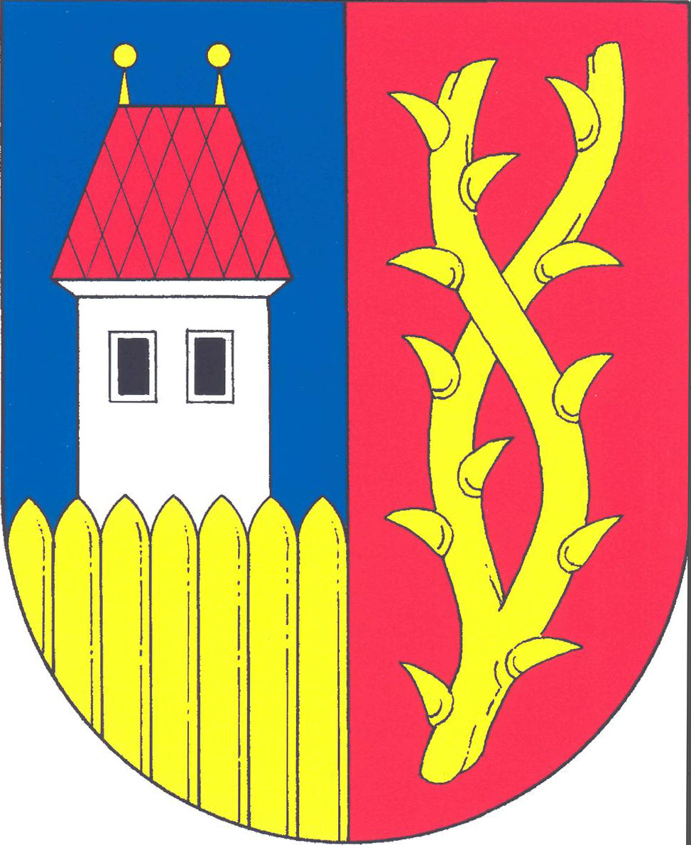 Znak obce Všeradice